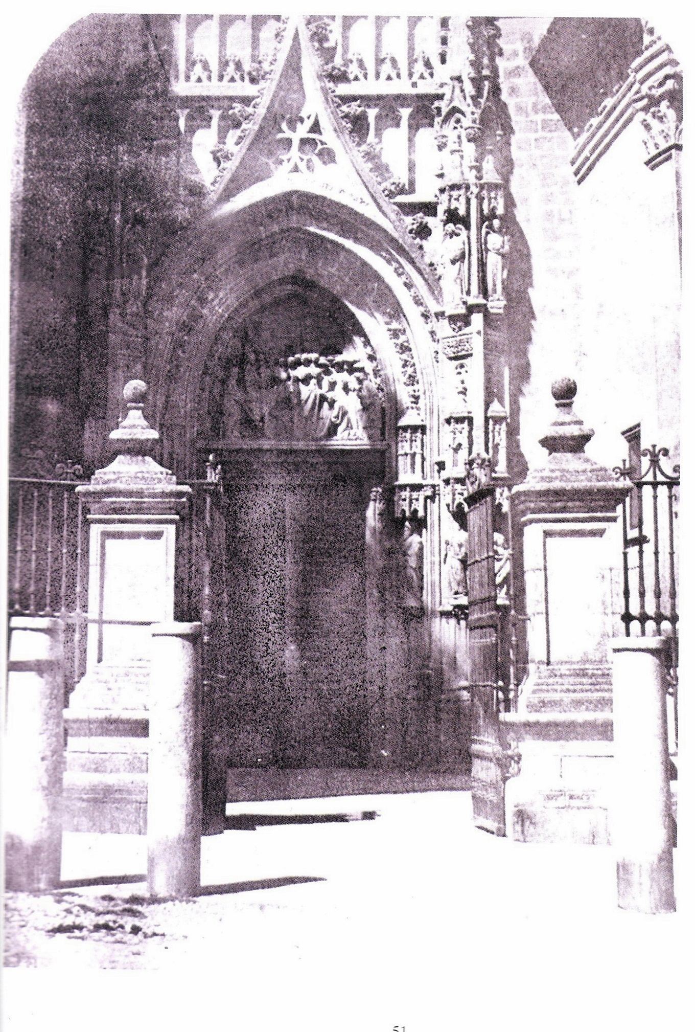 Una puerta de la catedral. Calotipo. 10x14 cm